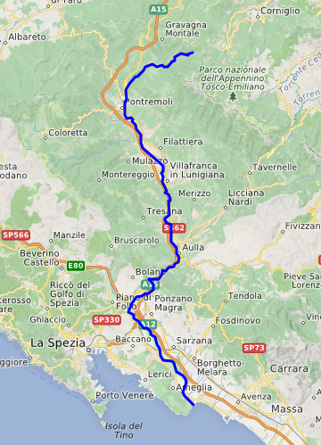 carte réalisée sur umap